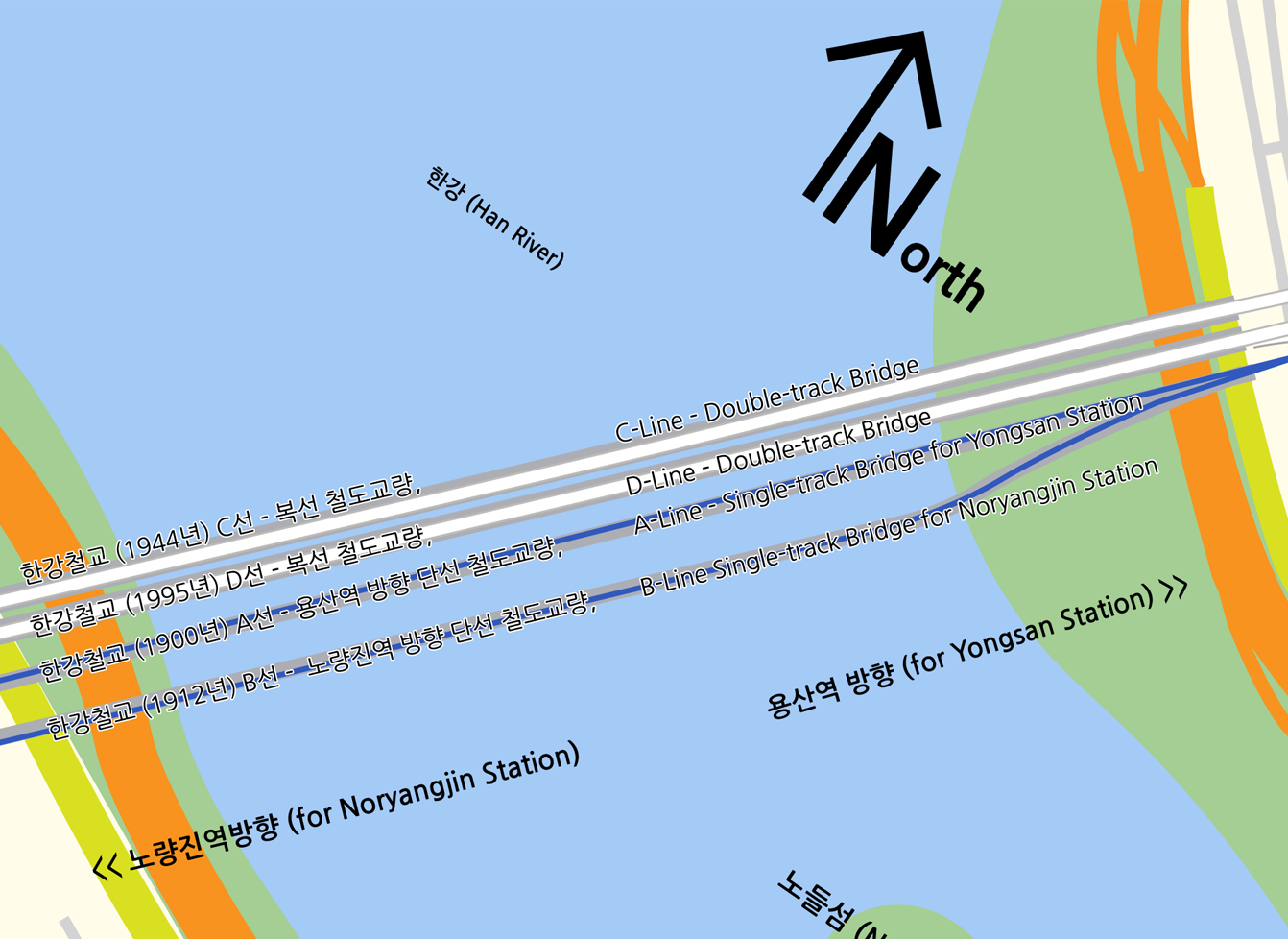 한강철교구조설명